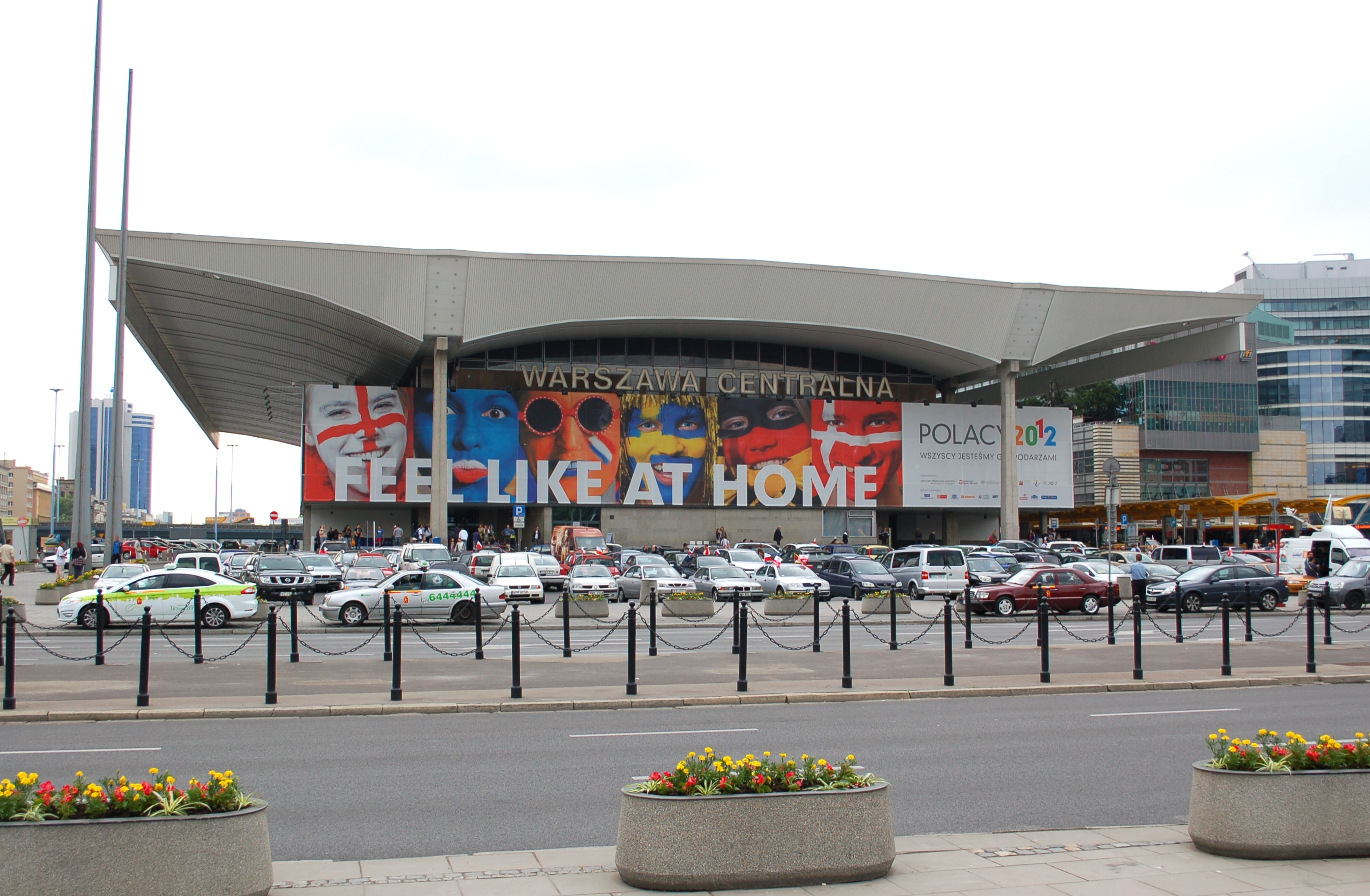 Warschau UEFA 2012